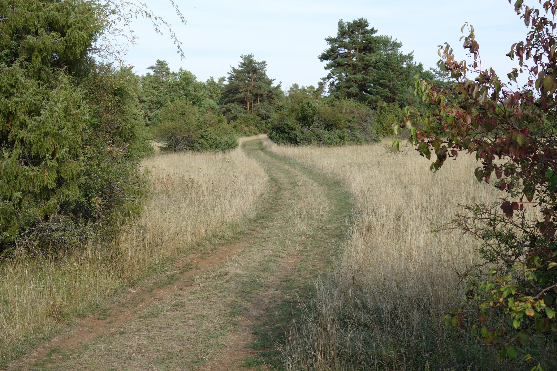 Trockenes Gras auf Kalksteinuntergrund im Spätsommer, nach längerer Trockenperiode.